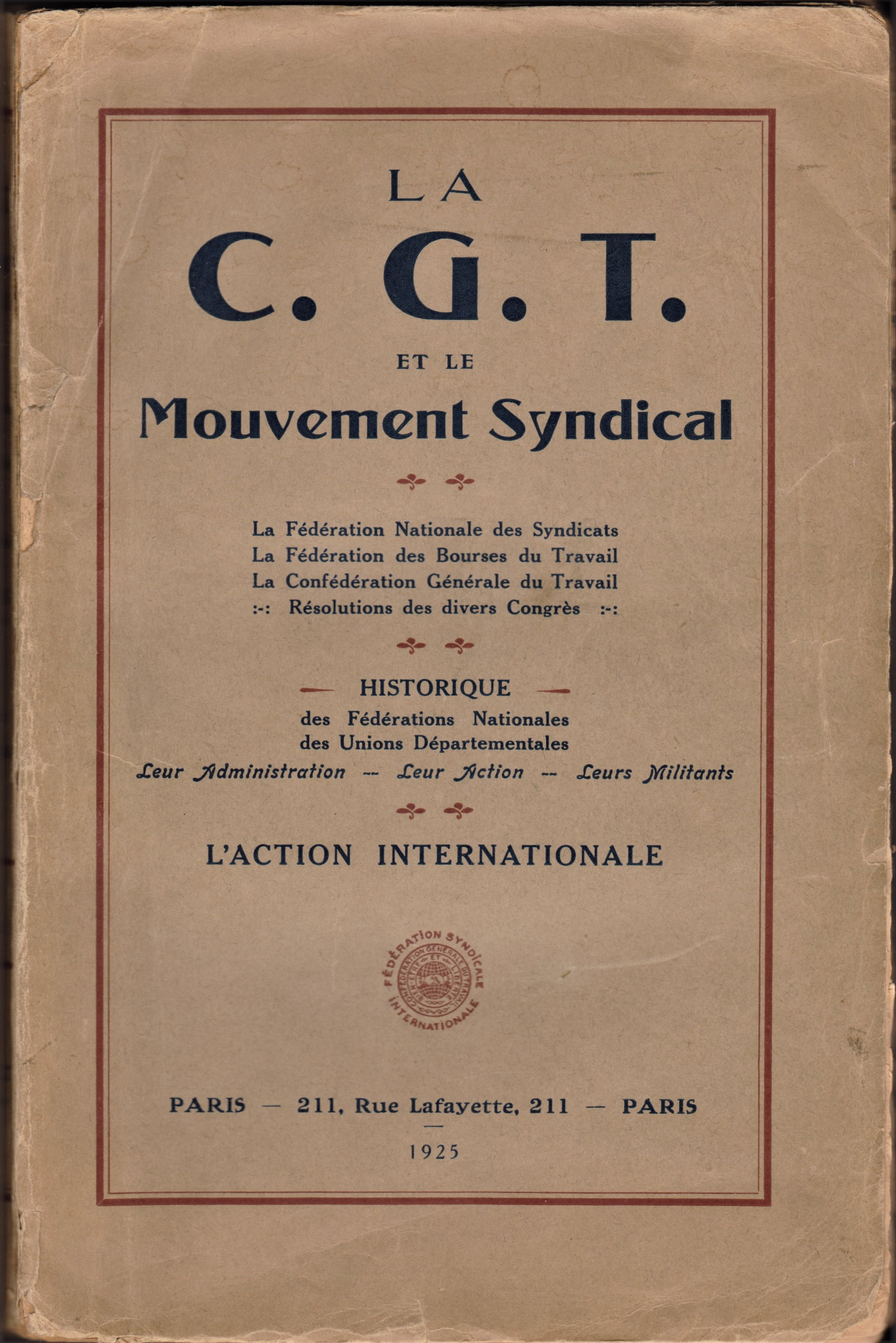 Opus édité en 1925 pour le trentième anniversaire de la Confédération générale du travail. Éditions de la CGT, 211 rue Lafayette, Paris. 700 pages. Imprimerie : Union typographique, 36 rue Jules Guesde, à Villeneuve-Saint-Georges. Préface de Léon Jouhaux.